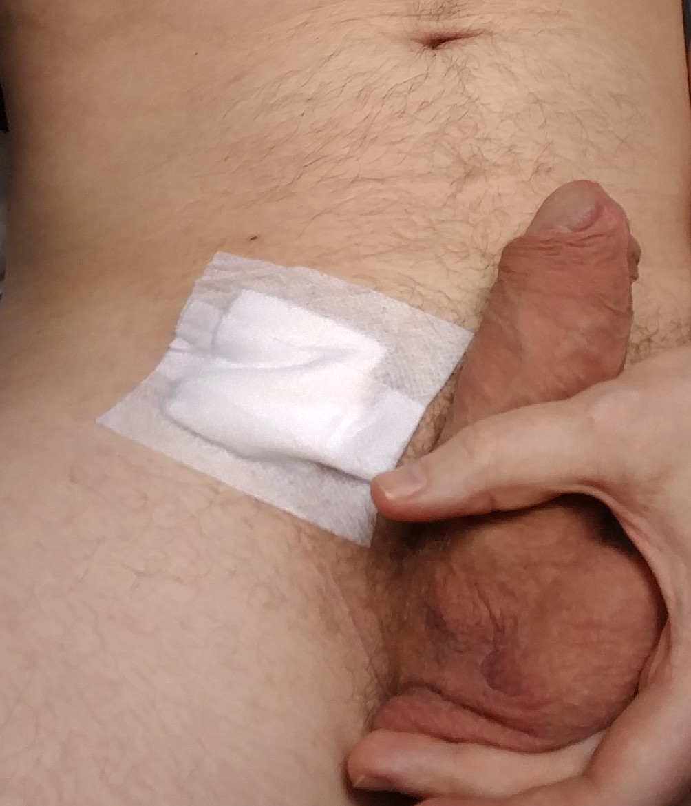 Vista después de la orquectomía inguinal